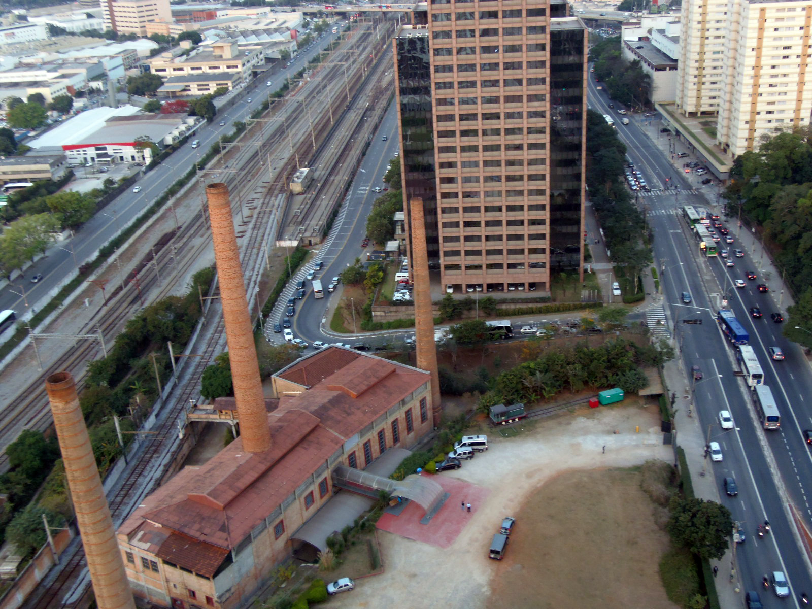 INDÚSTRIAS REUNIDAS FRANCISCO MATARAZZO